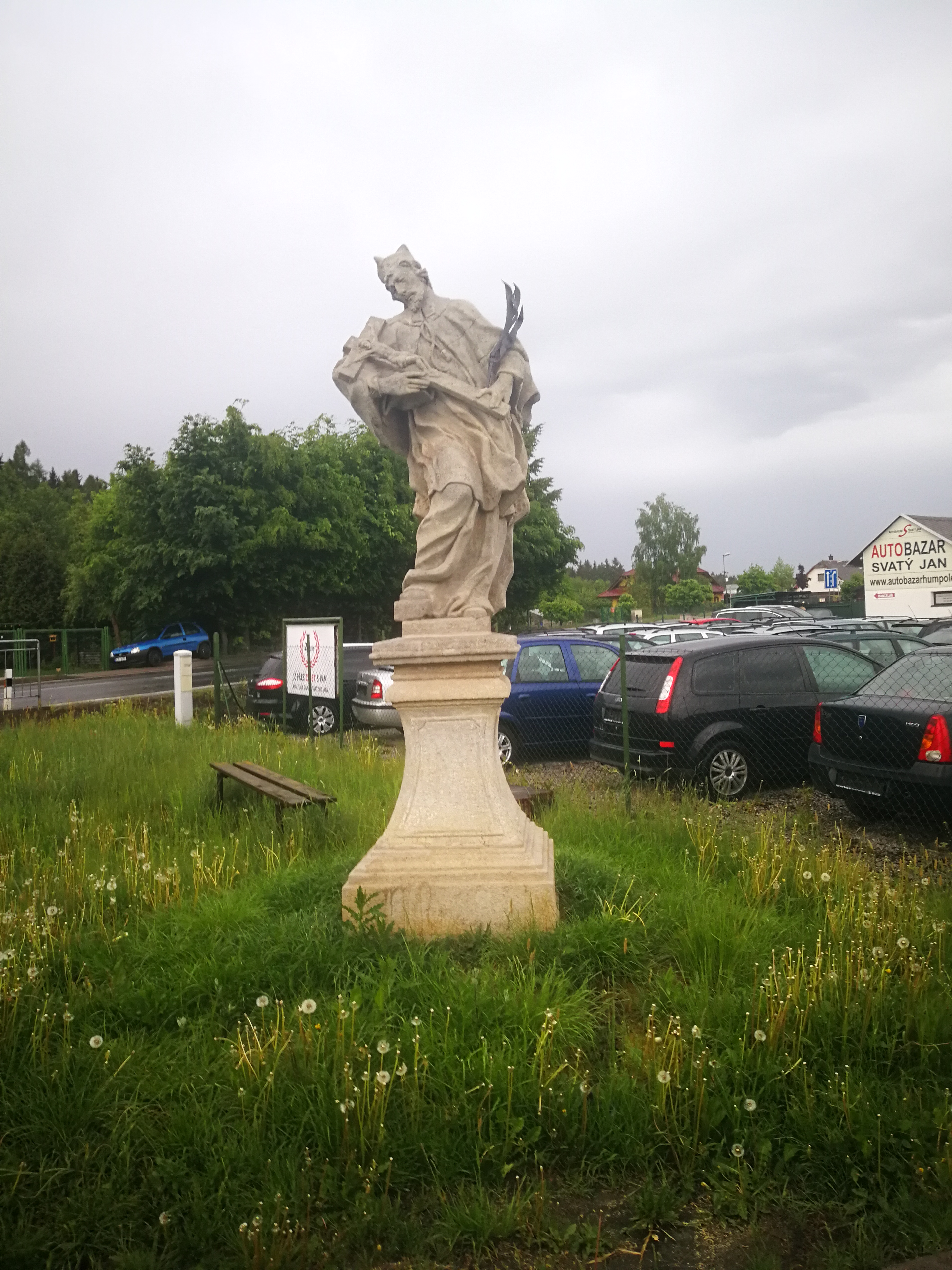 Socha svatého Jana Nepomuckého, Humpolec-Rozkoš.